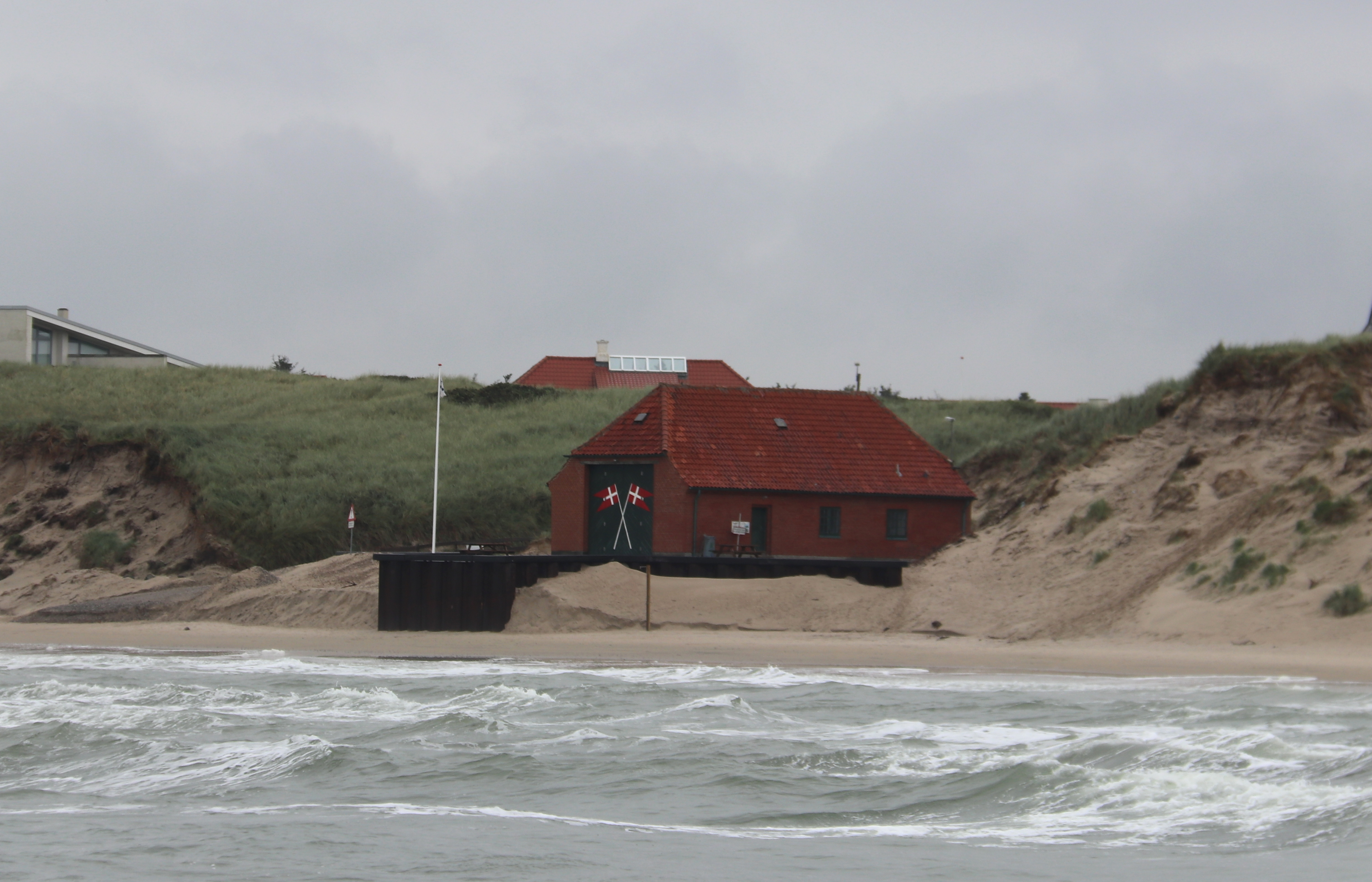 Loekken Bootshaus